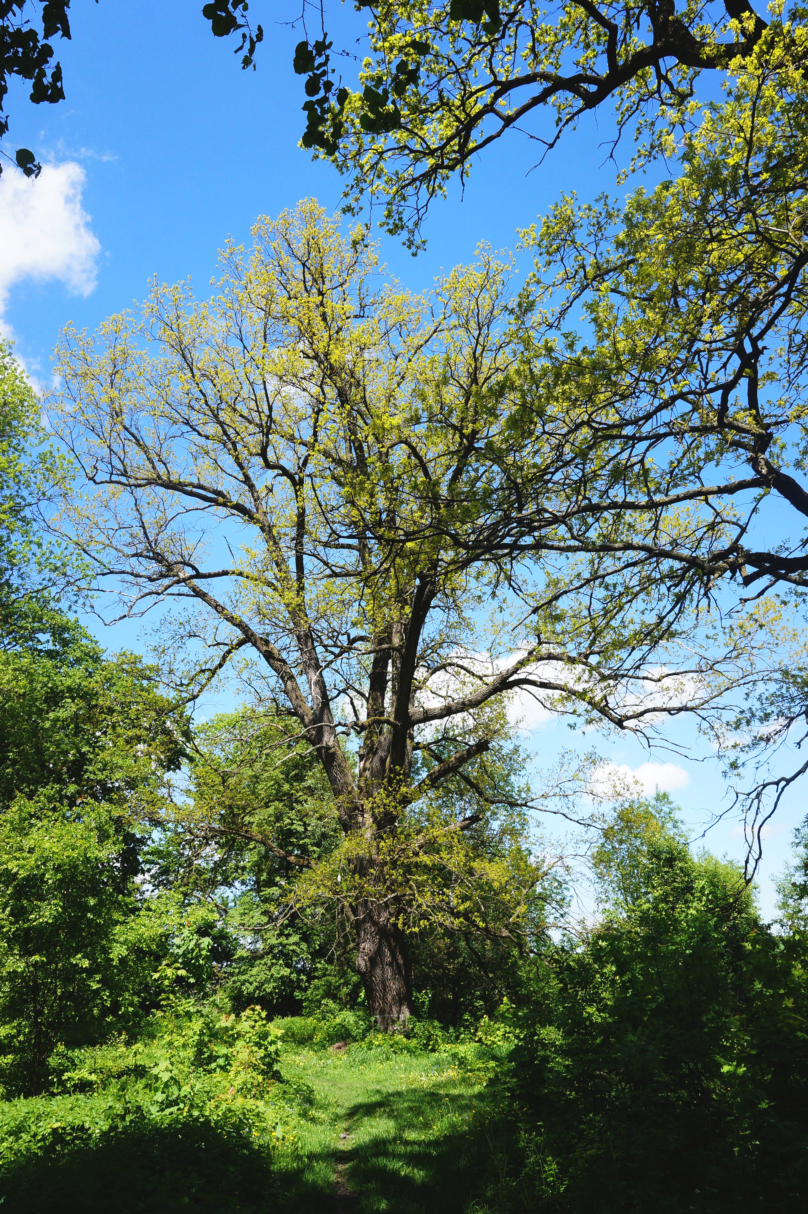 «Дубова алея», Гусятинський район, с. Яблунів, садиба санаторію